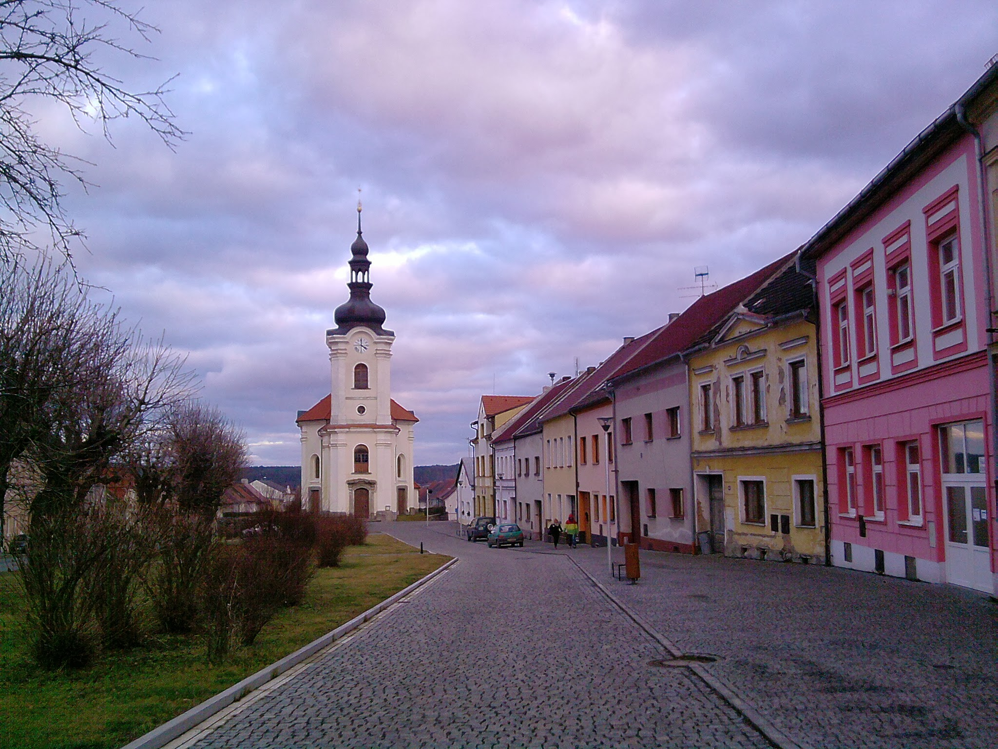 Černošín, Czech Republic